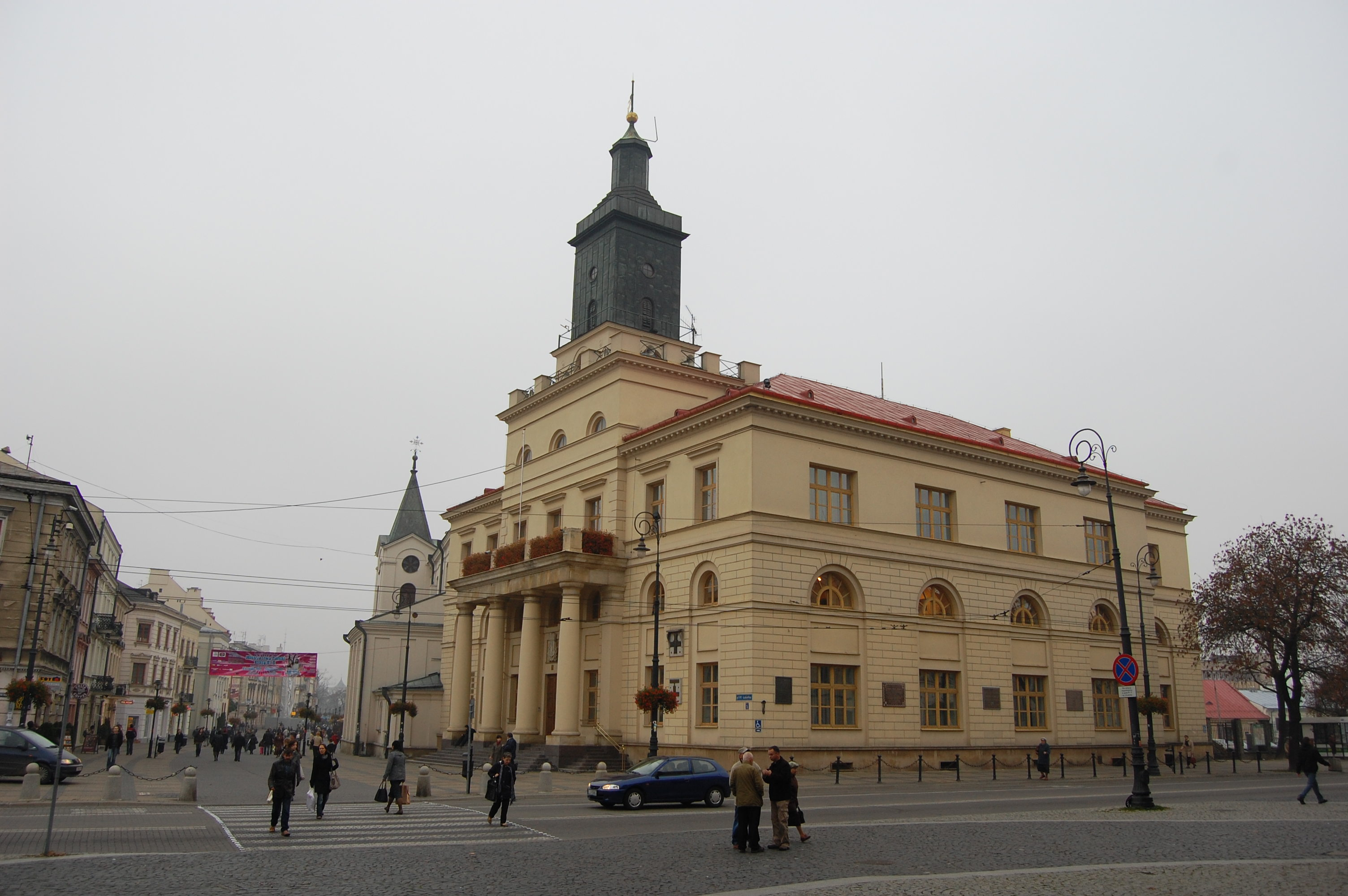 Krakowskie Przedmieście w Lublinie - Nowy Ratusz.